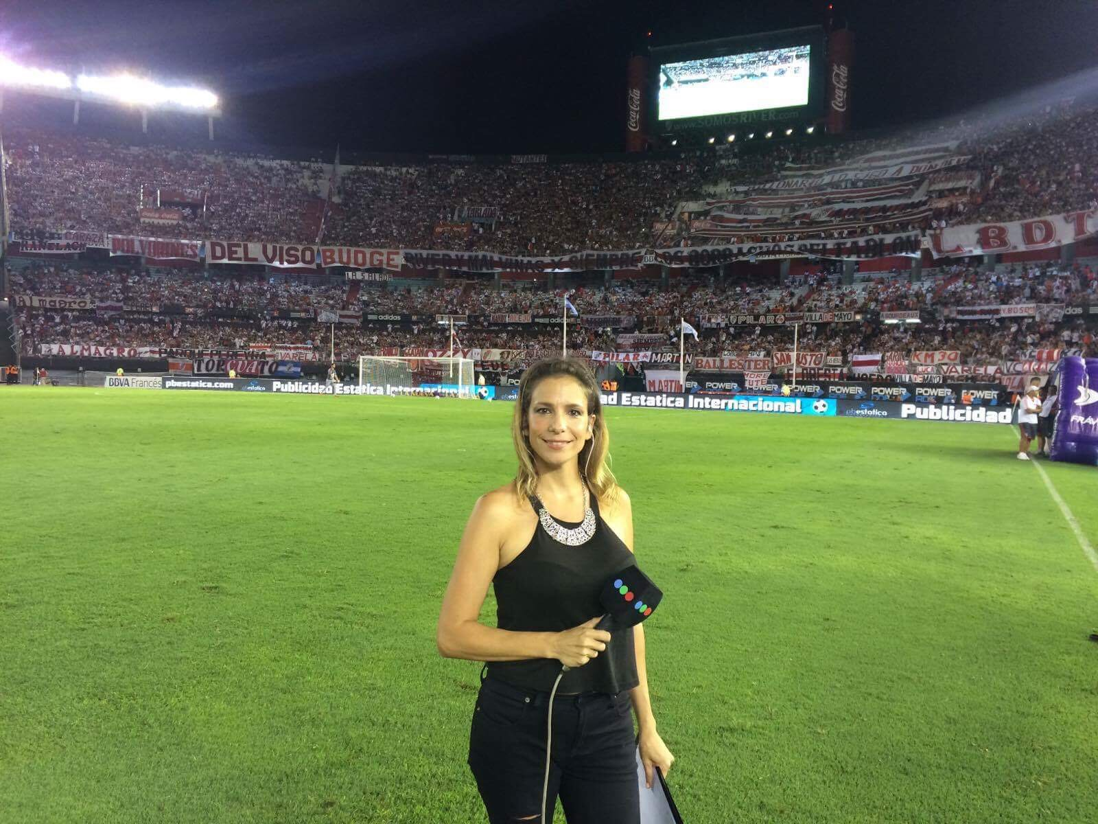 Alta Resolución